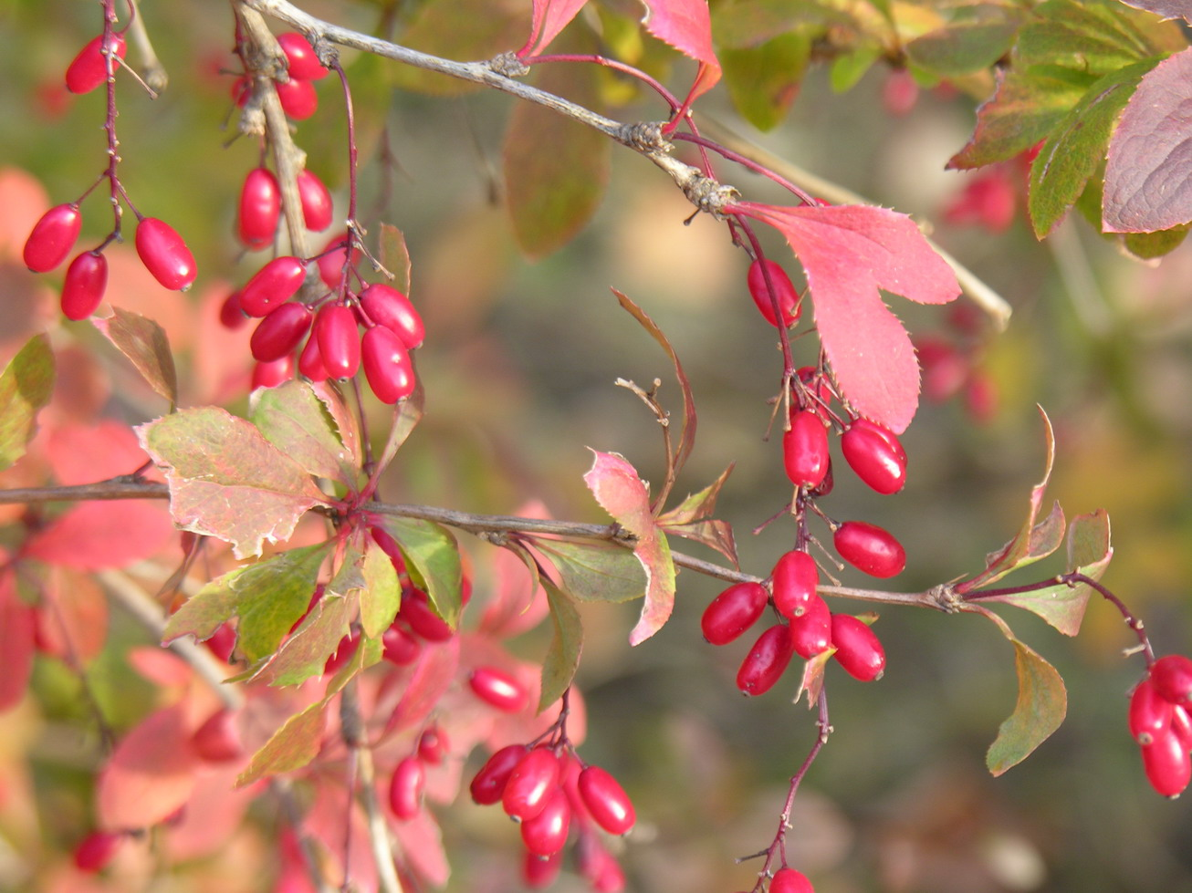 Paprastasis raugerškis (Berberis vulgaris) Fam. Raugerškiniai (Berberidaceae) Foto: Algirdas, 2005 m. lapkričio 3 d., Lietuva.